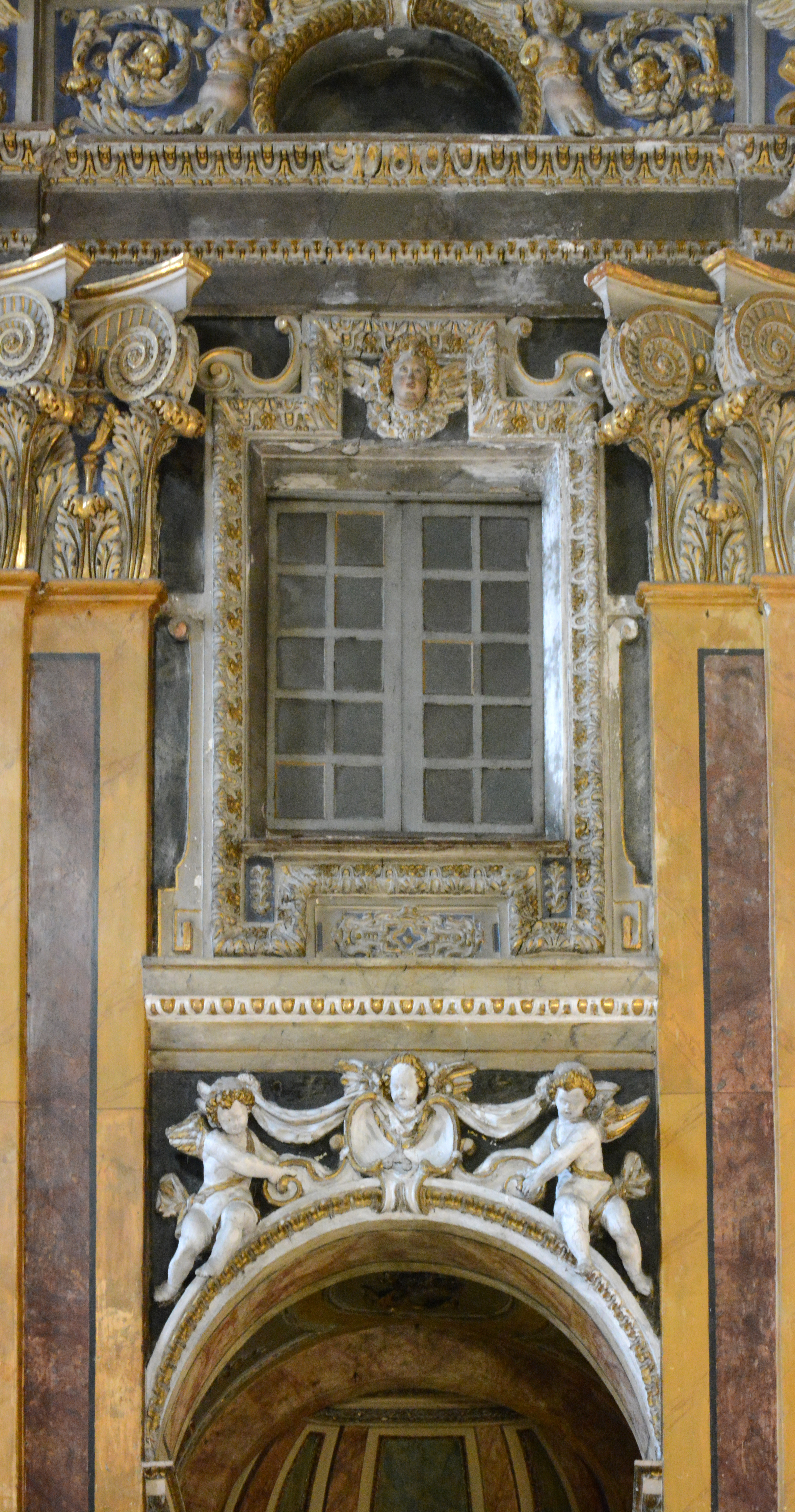 Intérieur de l’Église Saint-Jacques-le-Majeur_Nice (Rue Droite dans le Vieux-Nice, Alpes-Maritimes, Sud de la France). Sur les côtés de la nef, des fenêtres sont visibles.